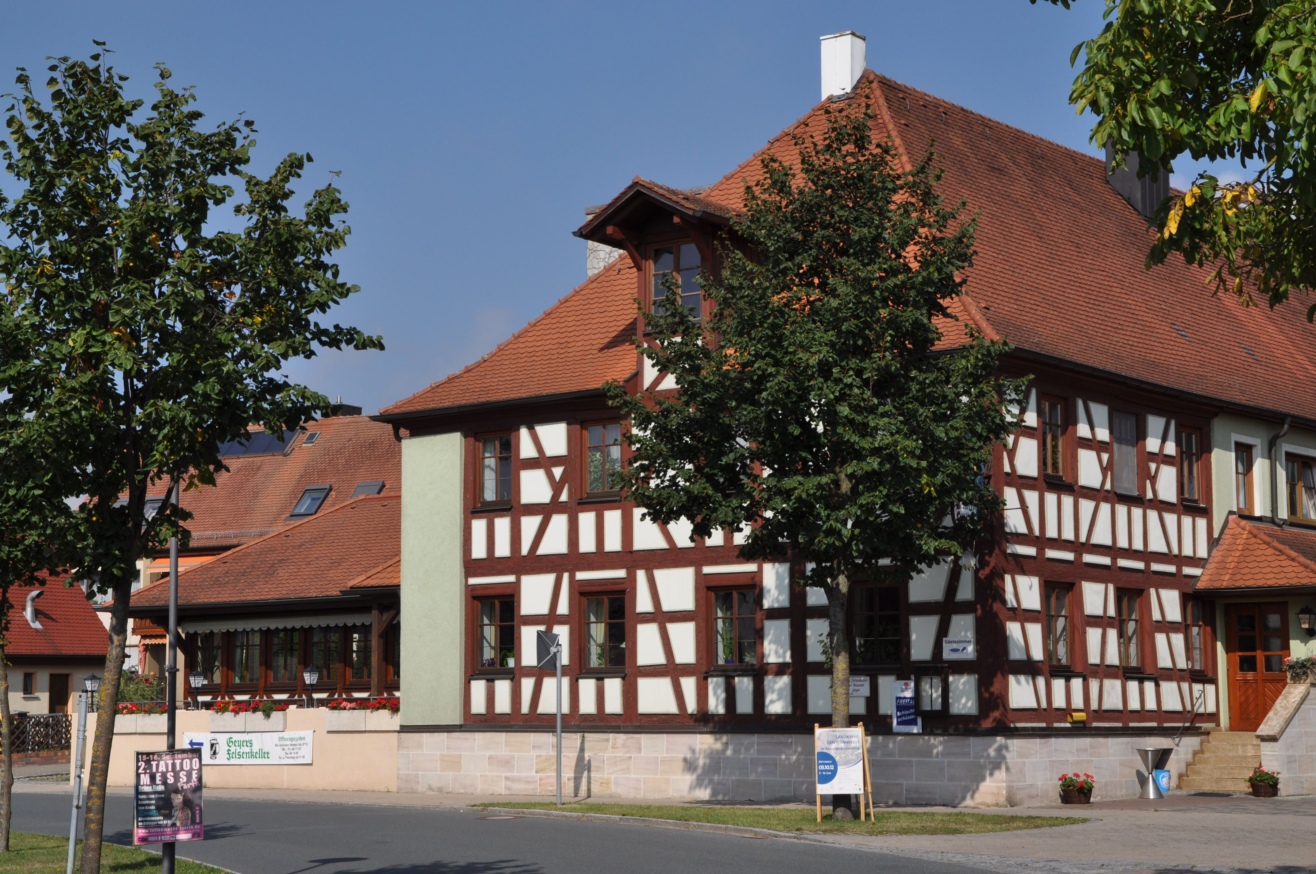 Brauerei Geyer, Walmdachbau, Fachwerk, 18./19. JahrhundertThis is a photograph of an architectural monument.